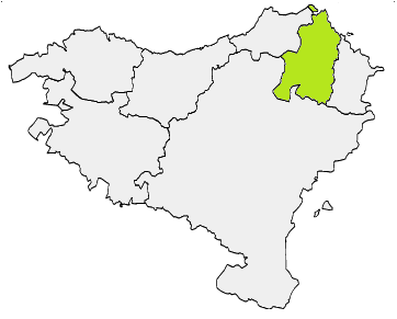 Situación de Baja Navarra en Vasconia.